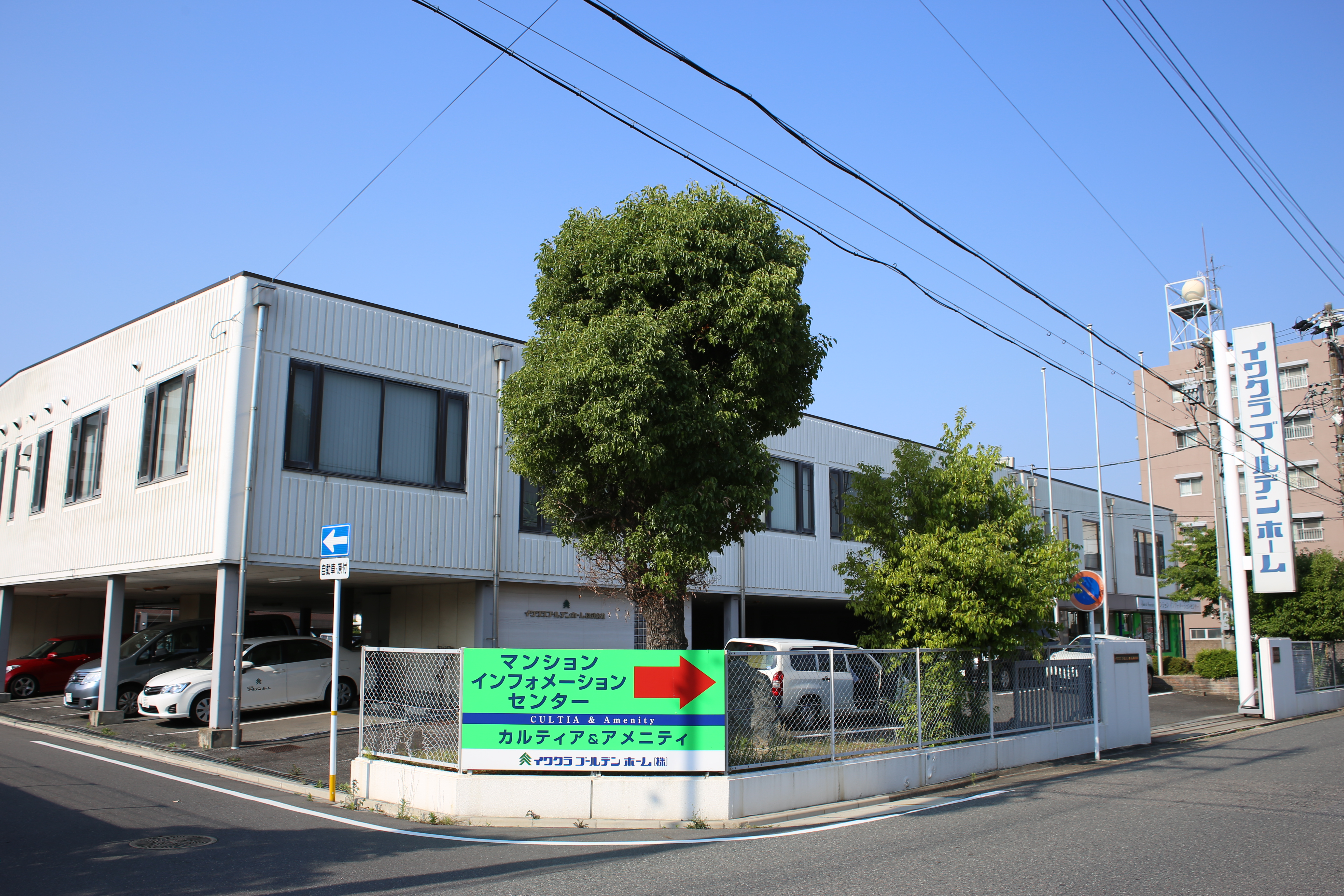 名古屋市港区新川町のイワクラゴールデンホーム本社を南側公道西側より撮影